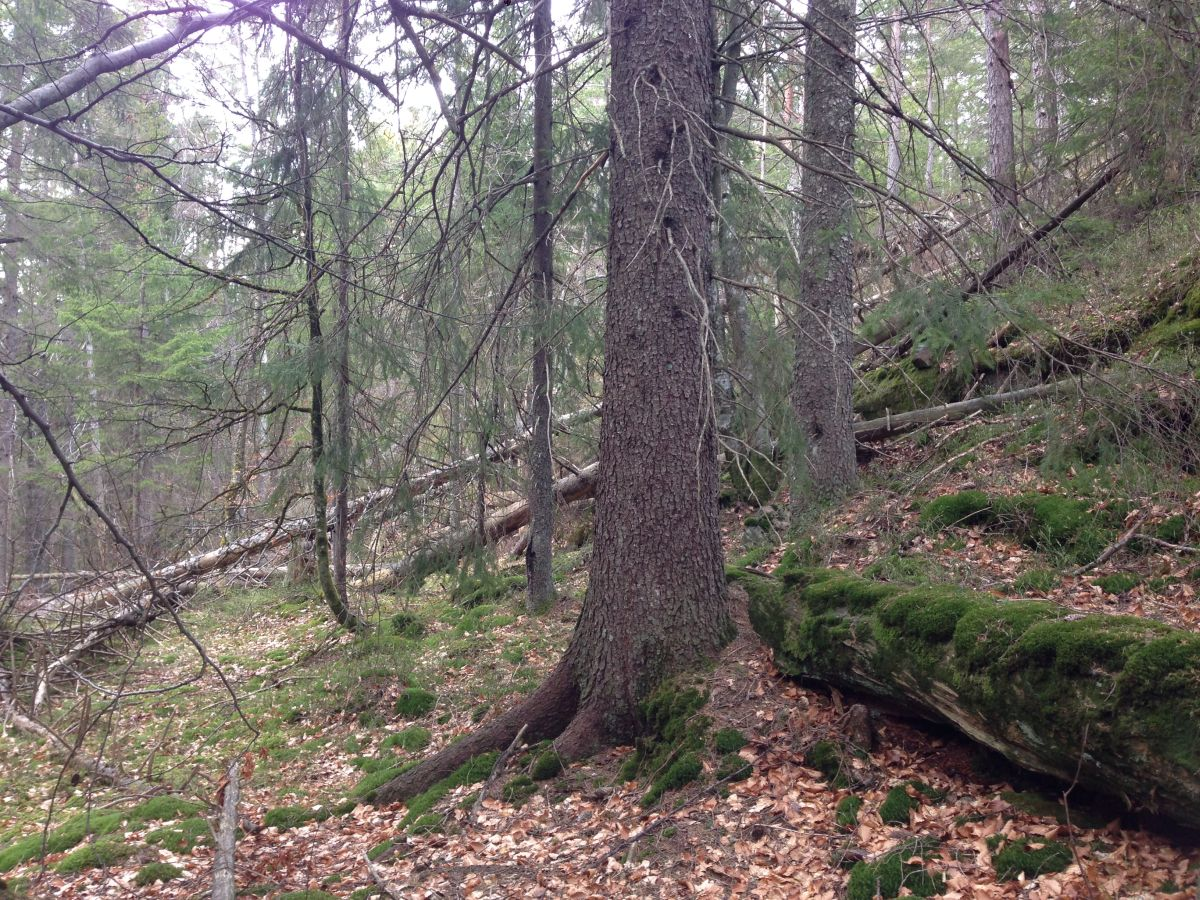 Storås og Spirås.